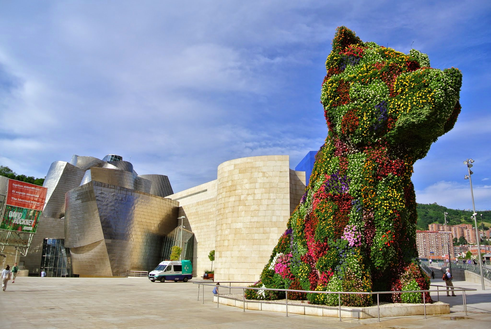 Abando, Bilbo, Bizkaia, Spain